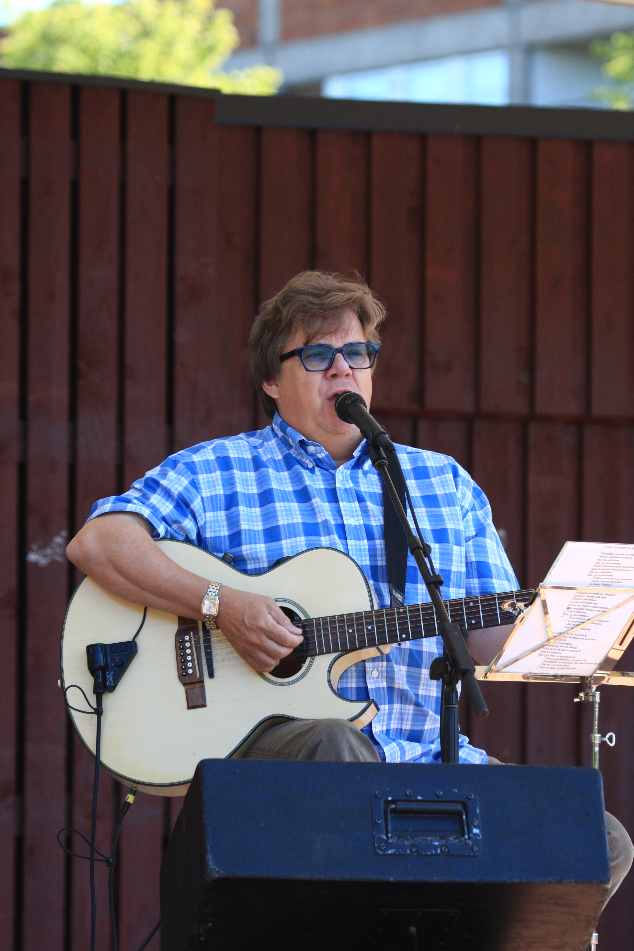 Mikko Alatalo suomalainen iskelmälaulaja